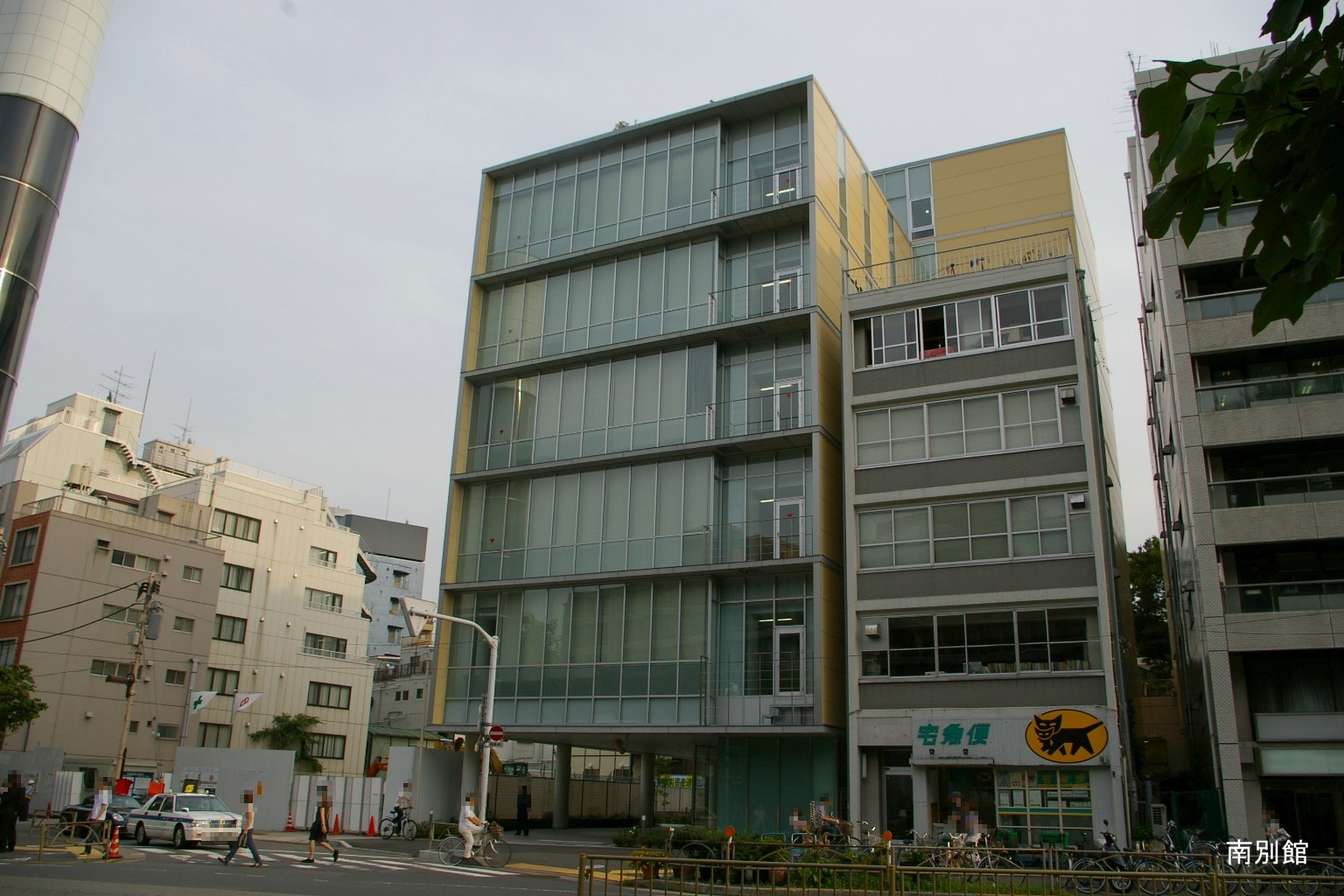 2009.5東京都内で塾生 (talk)が撮影。